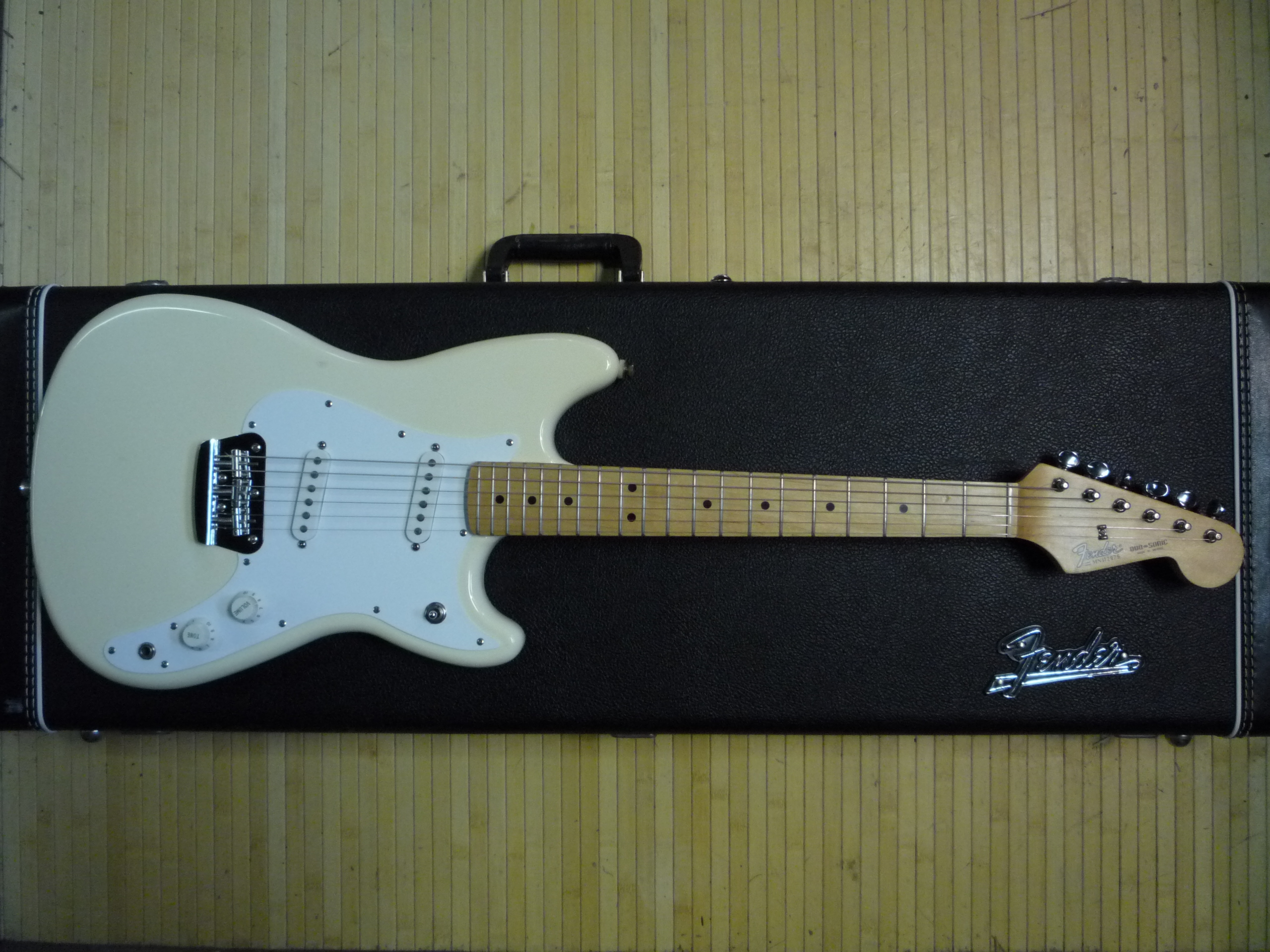 Fender Duo-Sonic MIM reisue